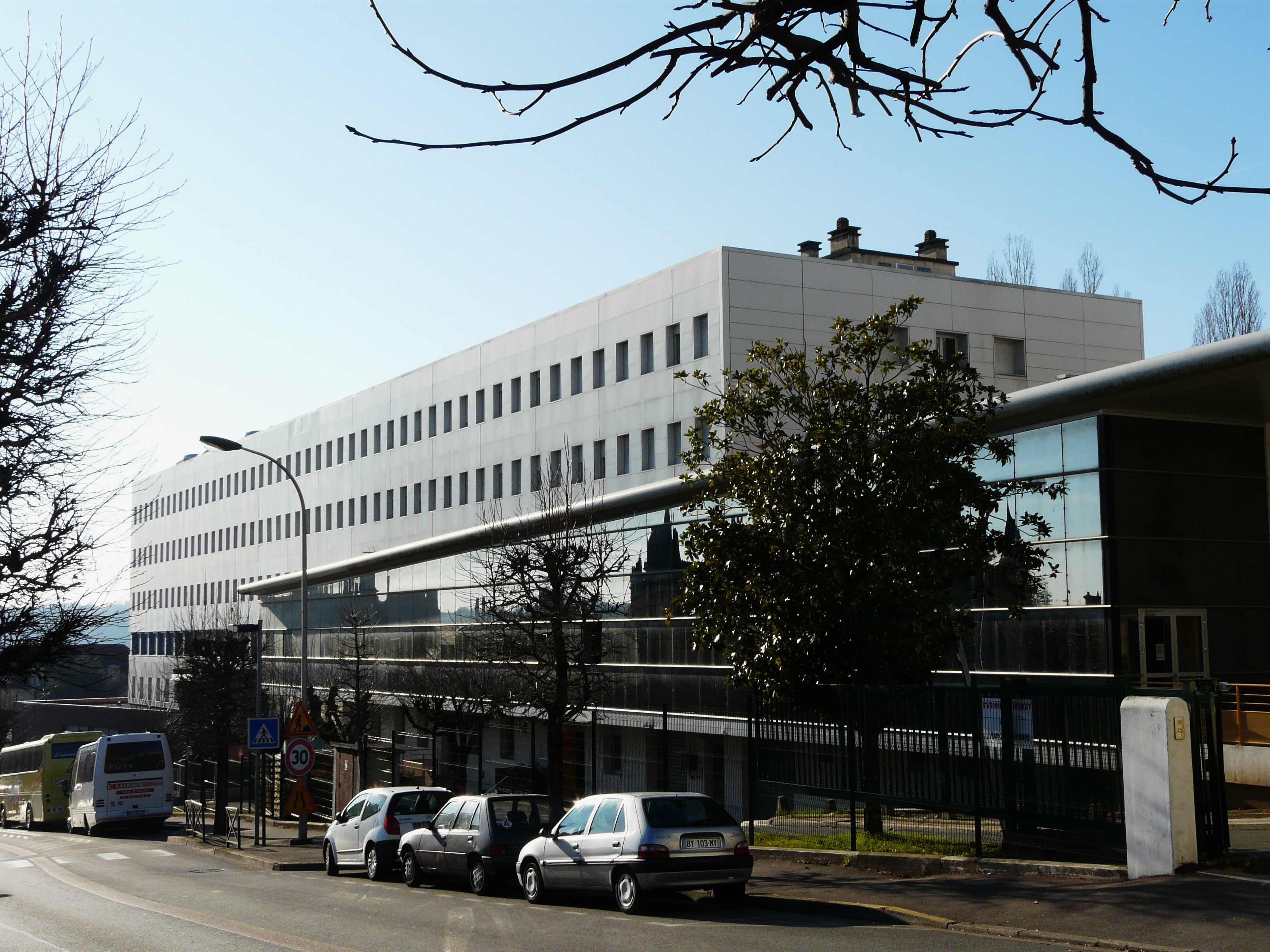 Le lycée Laure-Gatet, avenue Georges-Pompidou, Périgueux, Dordogne, France.